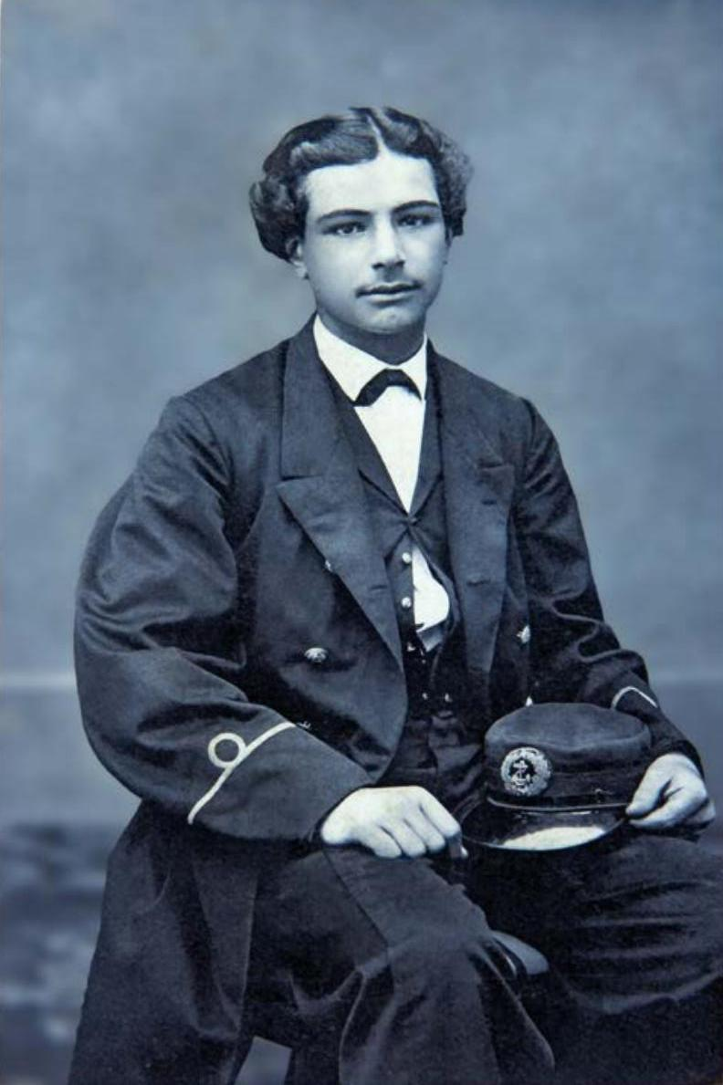 Arturo Prat a la edad de 16 años, con grado de guardiamarina (examinado), embarcado en La Esmeralda. Fotografia de Eugène Maunoury en Lima. En el reverso, se puede leer la dedicatoria a su tía Elvinia Chacón Barrios (colección particular). Descripción en Corporación Cultural Arturo Prat.